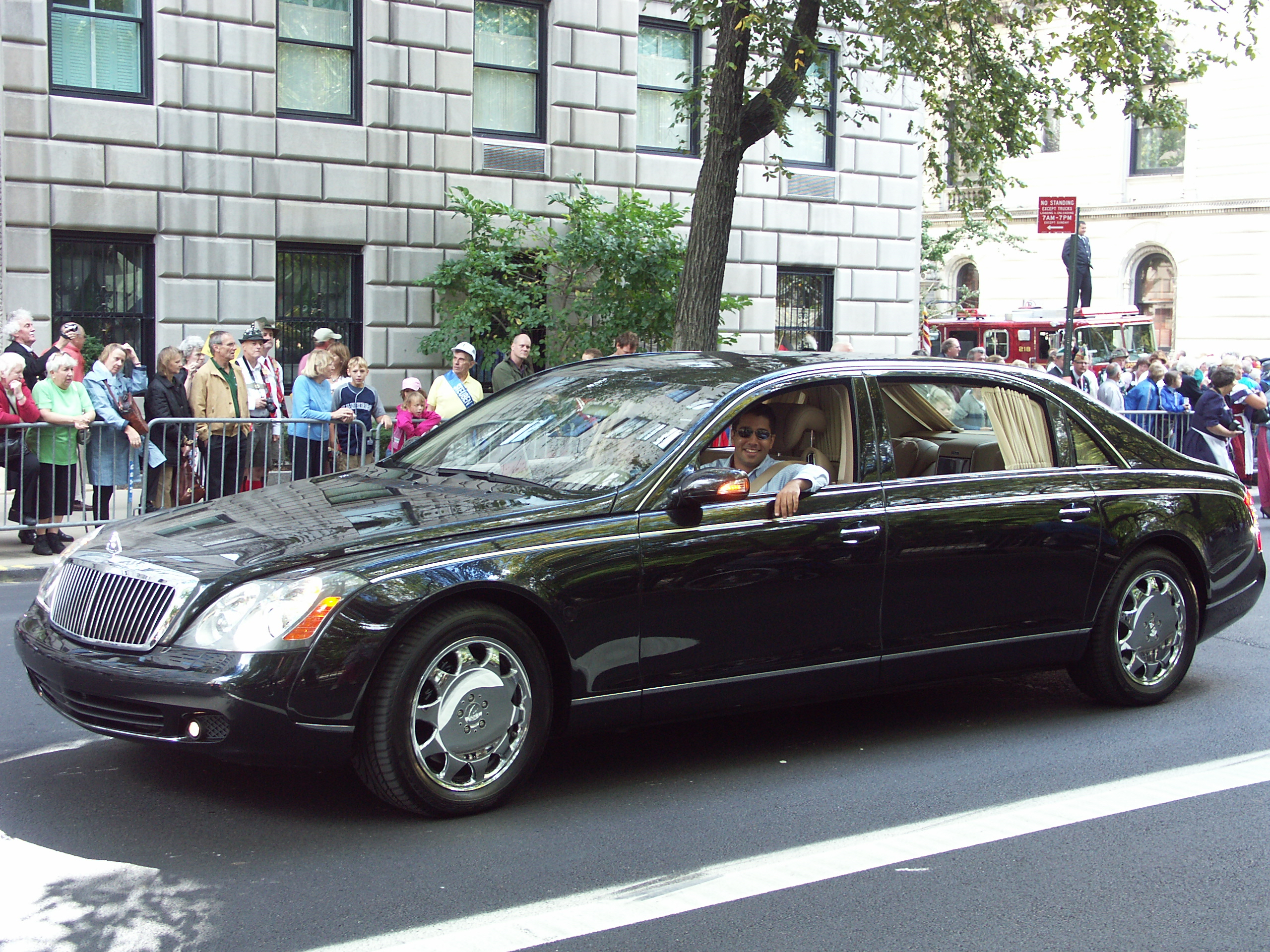 Mercedes Benz war einer der Sponsoren und hat dort seine Angebotspalette präsentiert :-)